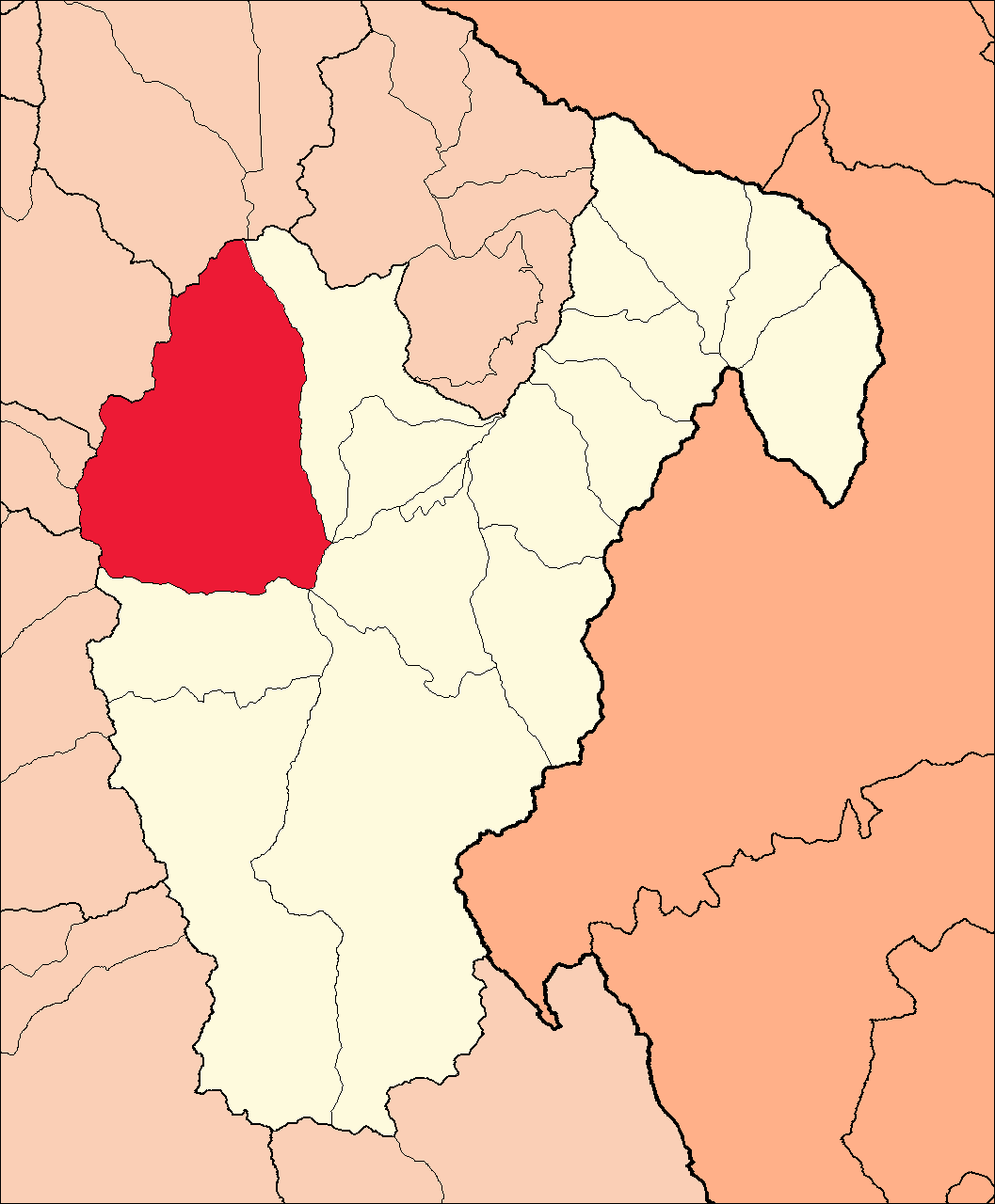 Área del distrito de Huari dentro de la provincia de Huari.